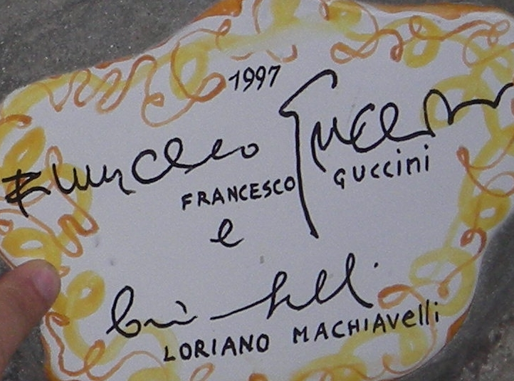 Foto fatta da me ad un autografo di Guccini al muretto di Alassio